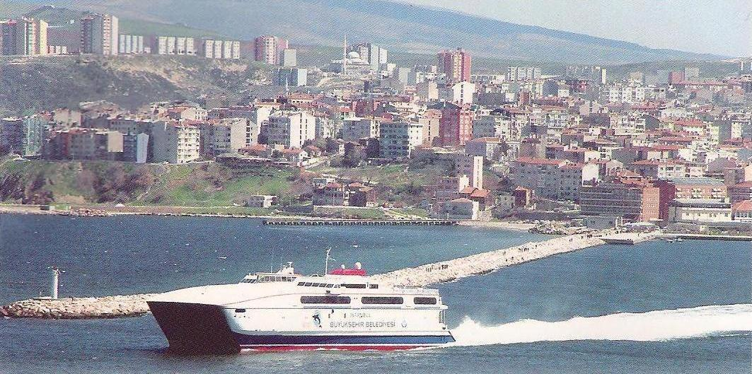 Bandırma